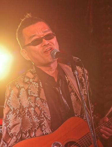 nomotoaru live photo